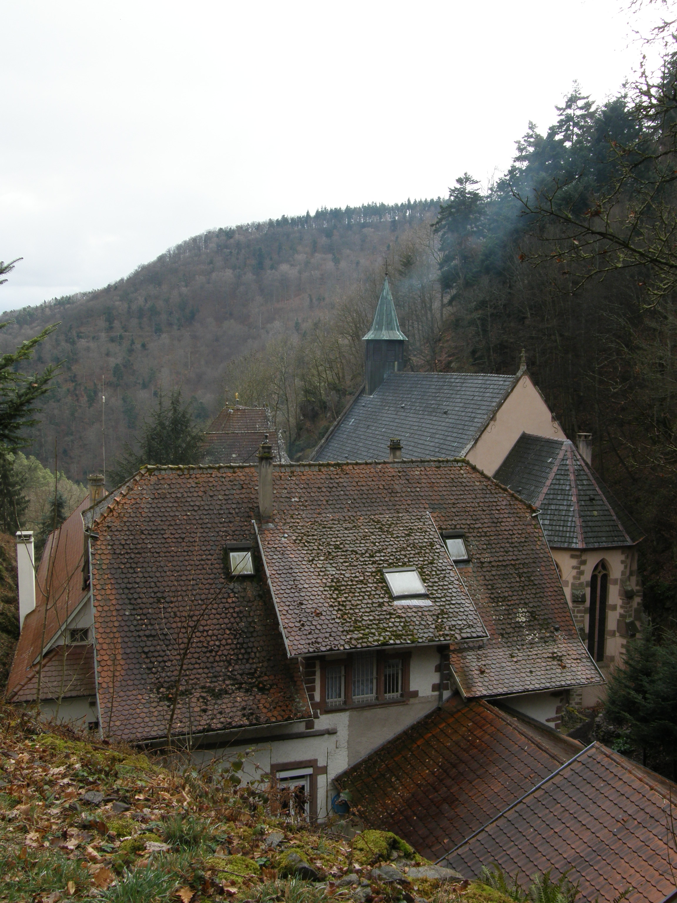 Photo des bâtiments dépendants du pèlerinage de Dusenbach